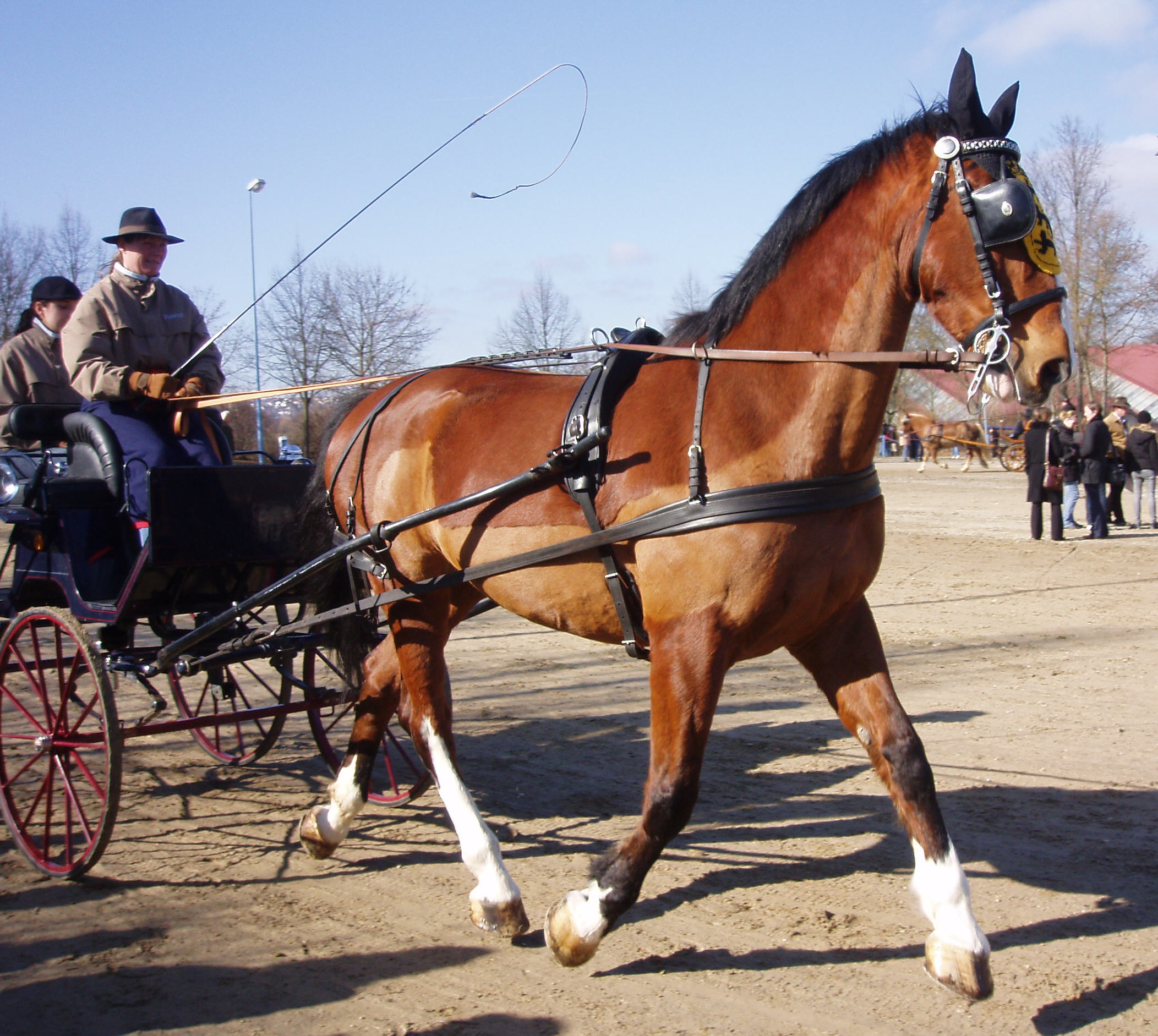 Gelderlandi a lópiacon